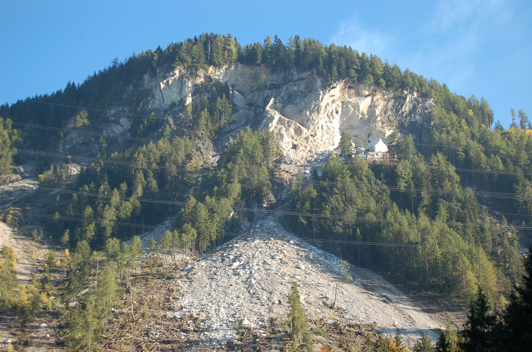 Der Eiblschrofen nach dem jüngsten Abbruch vom 16.10.2006